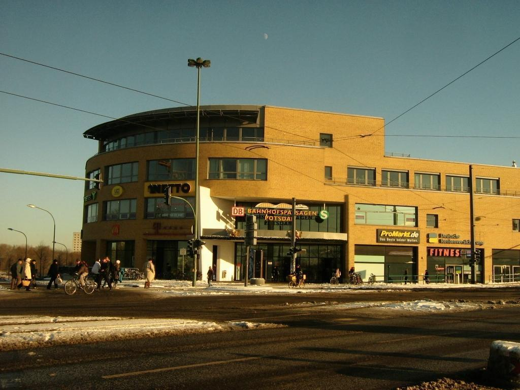 Der neue Hauptbahnhof in Potsdam